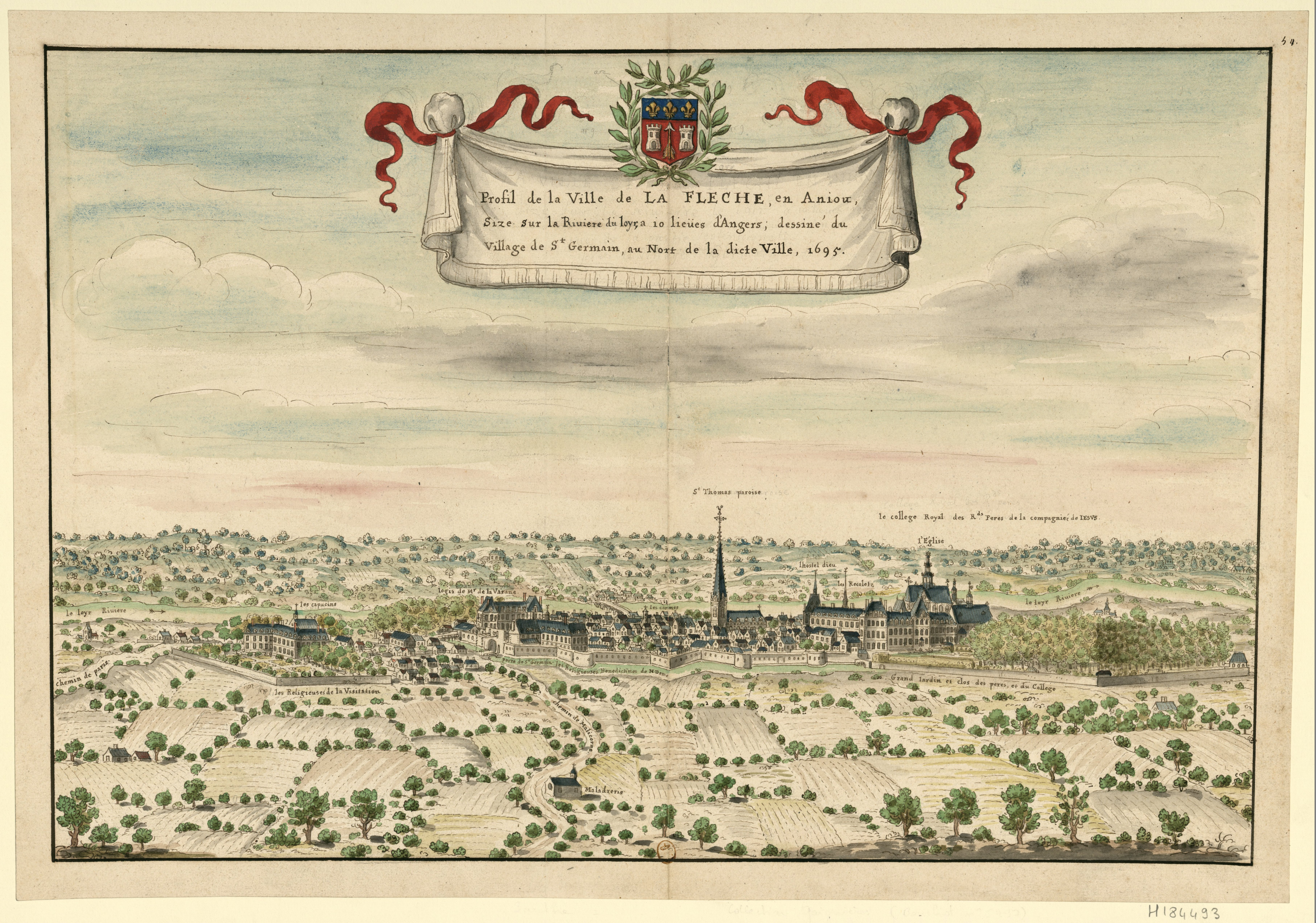 La ville de La Flèche dessinée par Louis Boudan en 1695